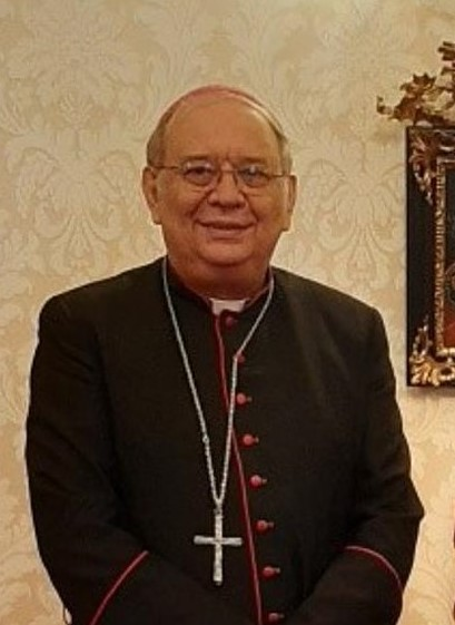 abp Ján Orosch